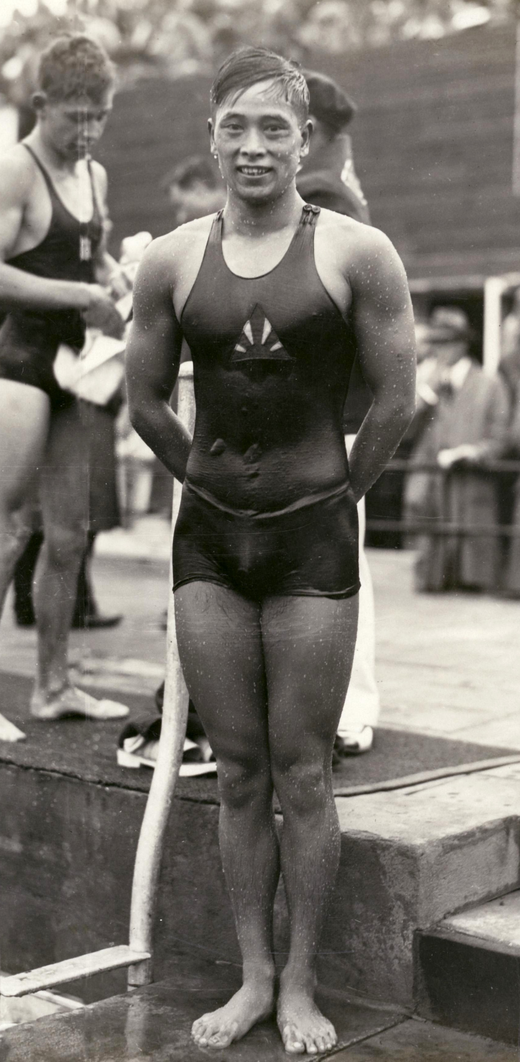 Sport. Olympische Spelen Amsterdam 1928. Zwemmen, heren : De Japanner Yosiyuki Turuta, winnaar van de 200 m schoolslag.